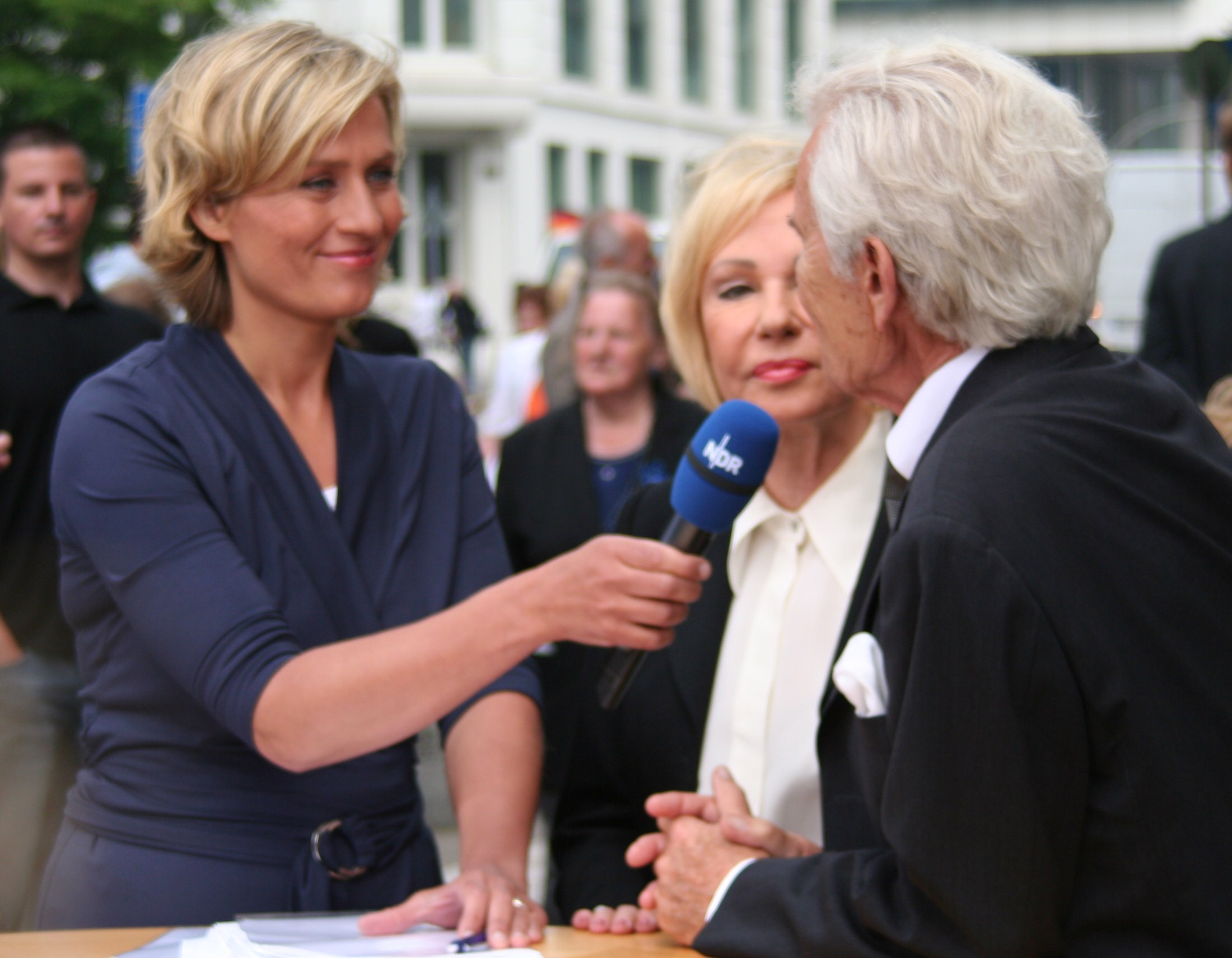 Susanne Stichler Wilhelm Wieben und Dagmar Berghoff im Interview